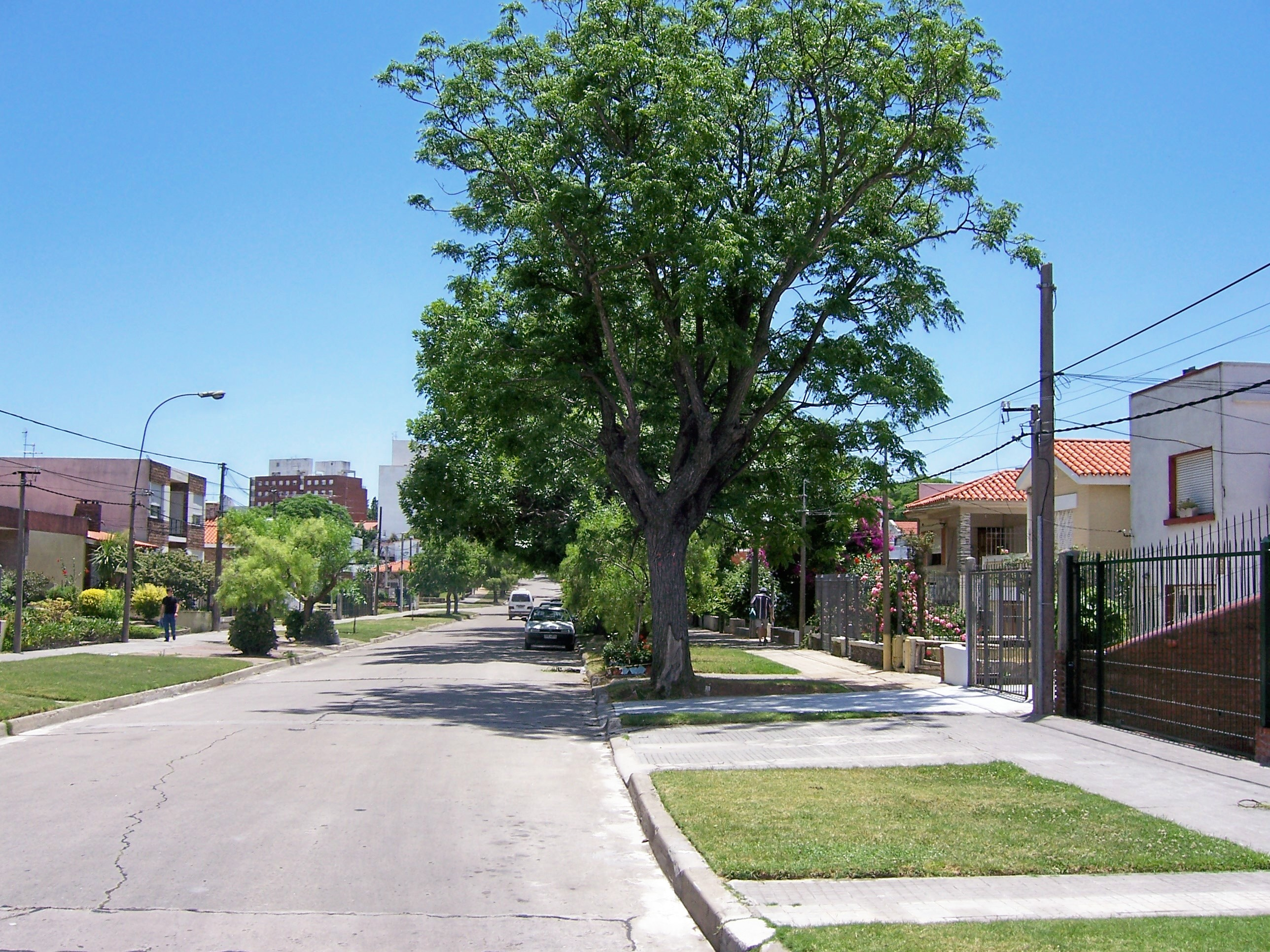 Calle Colombes, Montevideo, Uruguay.